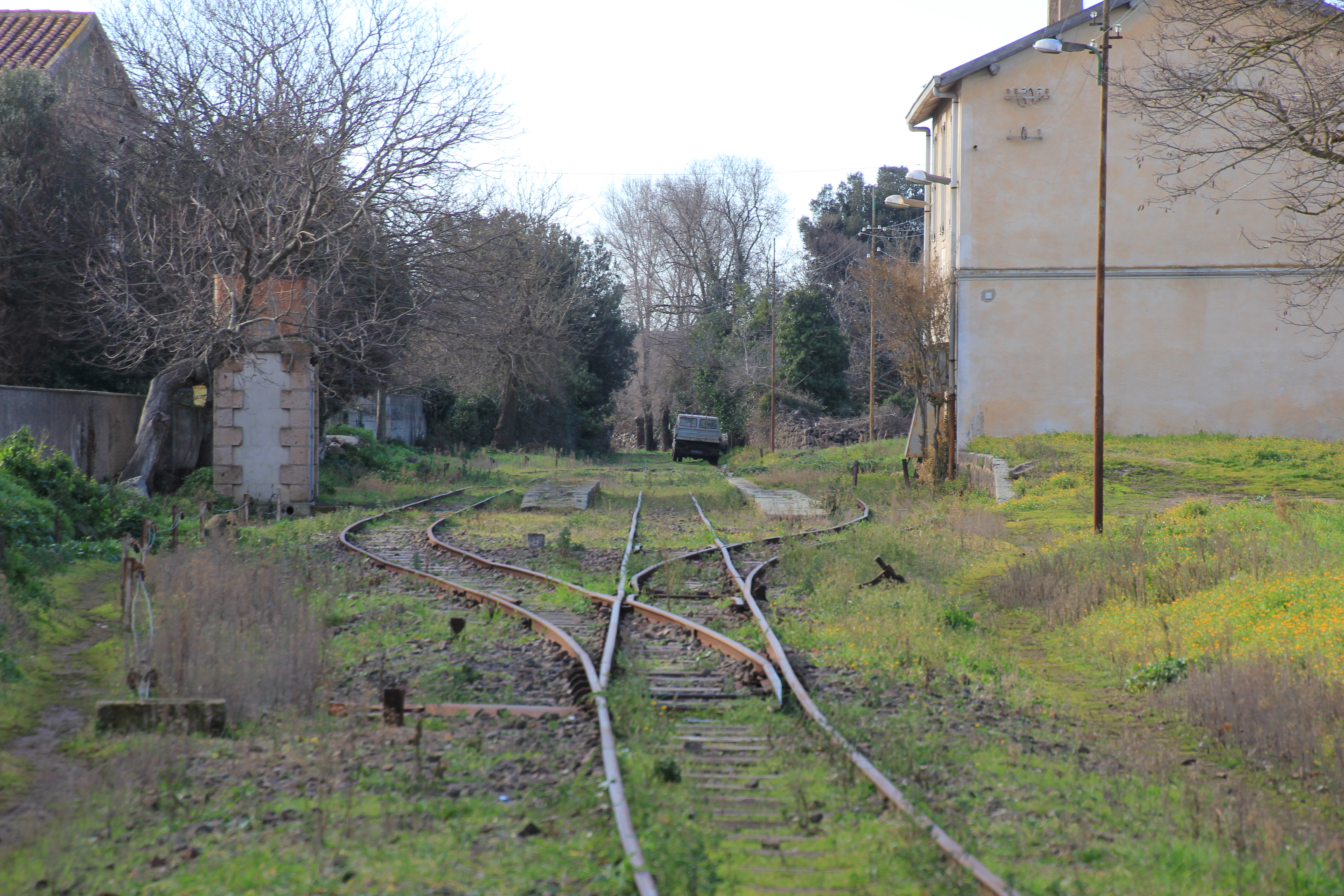 Sindia, stazione ferroviaria